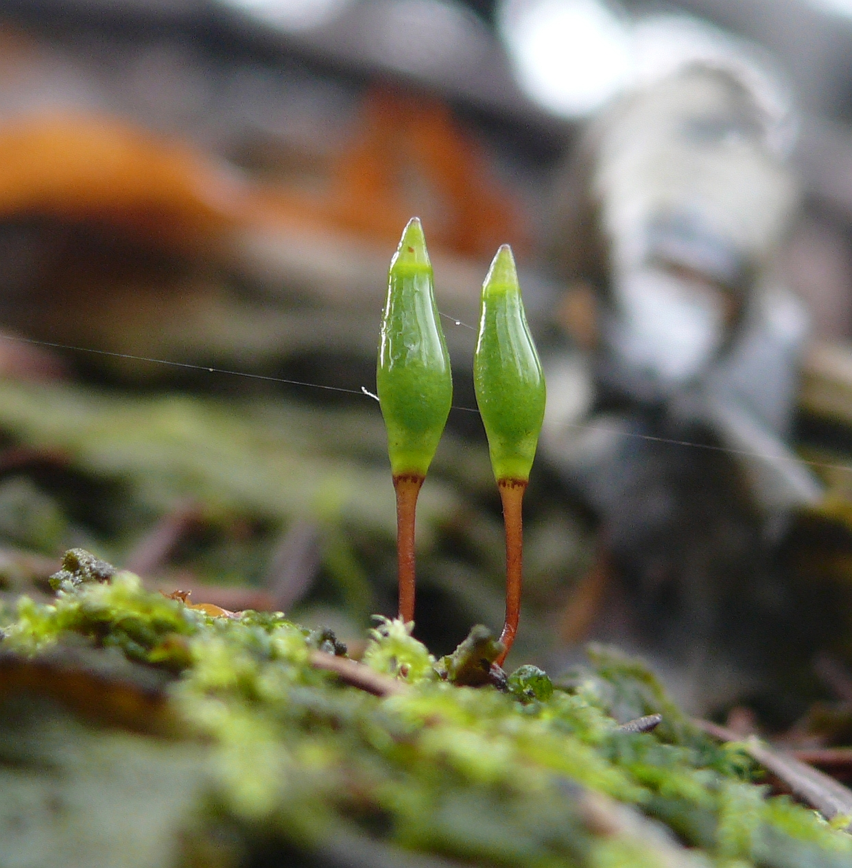 Buxbaumia viridis, Schwäbisch-Fränkische Waldberge, Deutschland